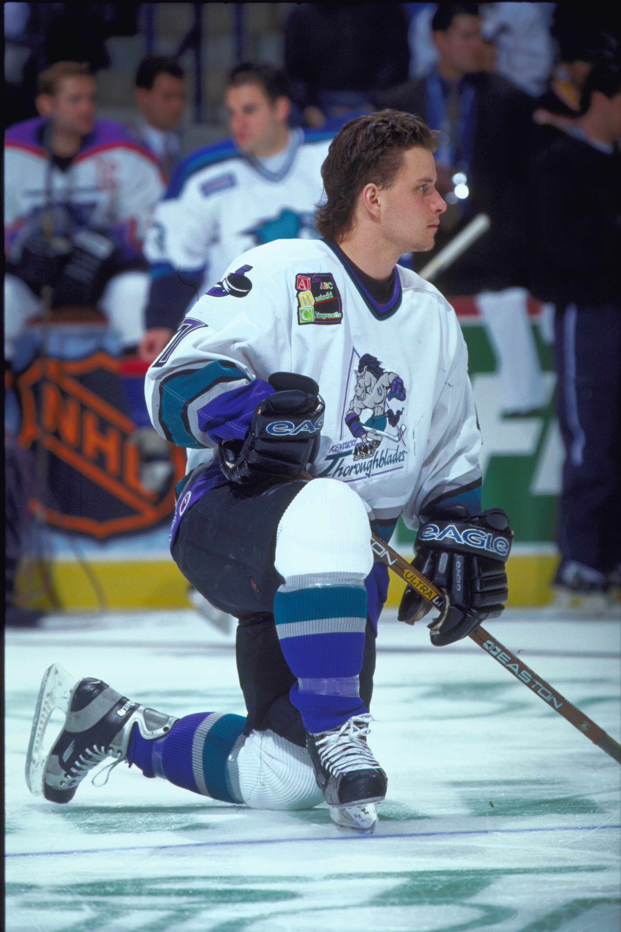 ahlstar0084